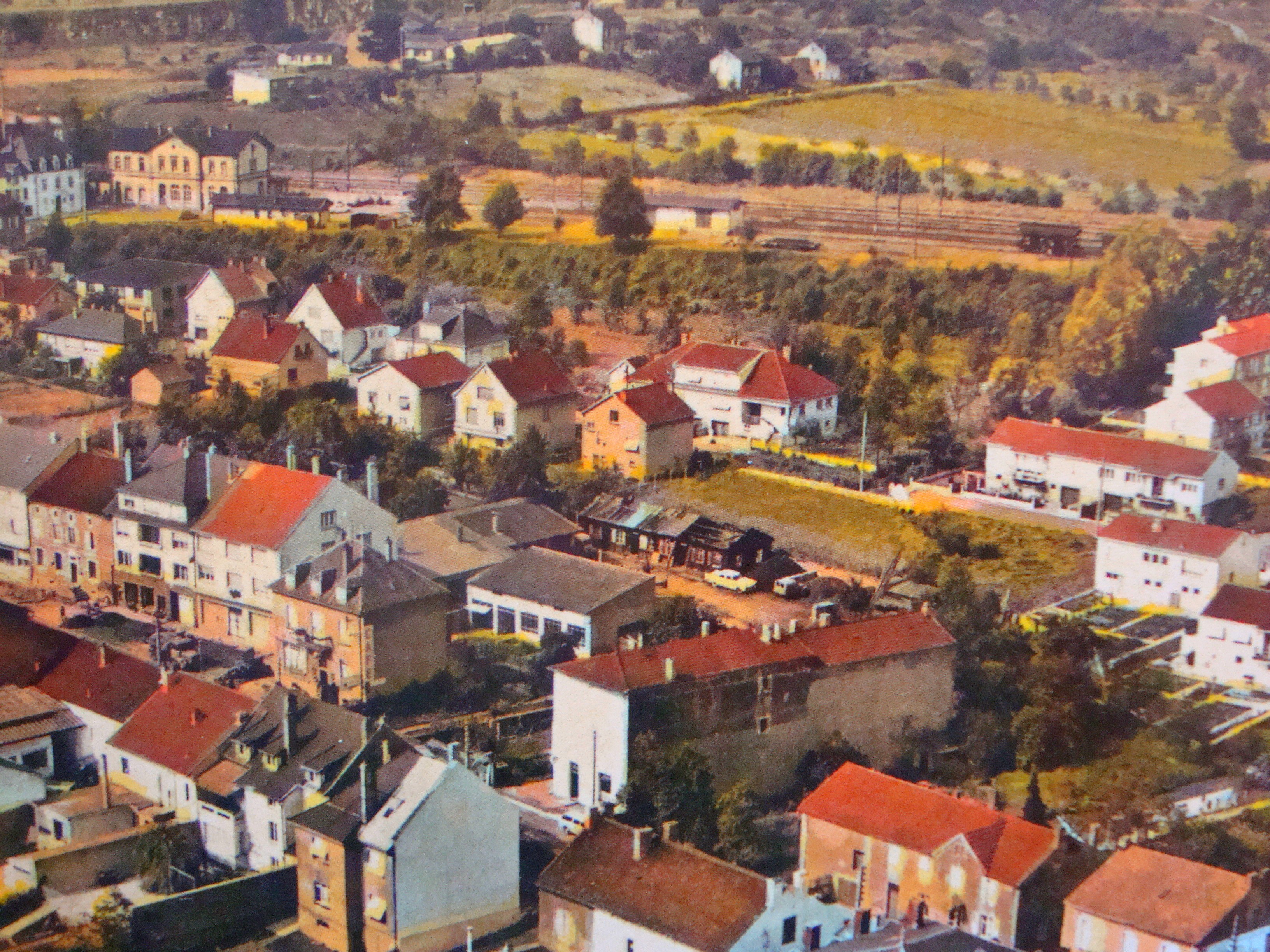 Hettange-Grande (57) - Quartier Maginot, 1962